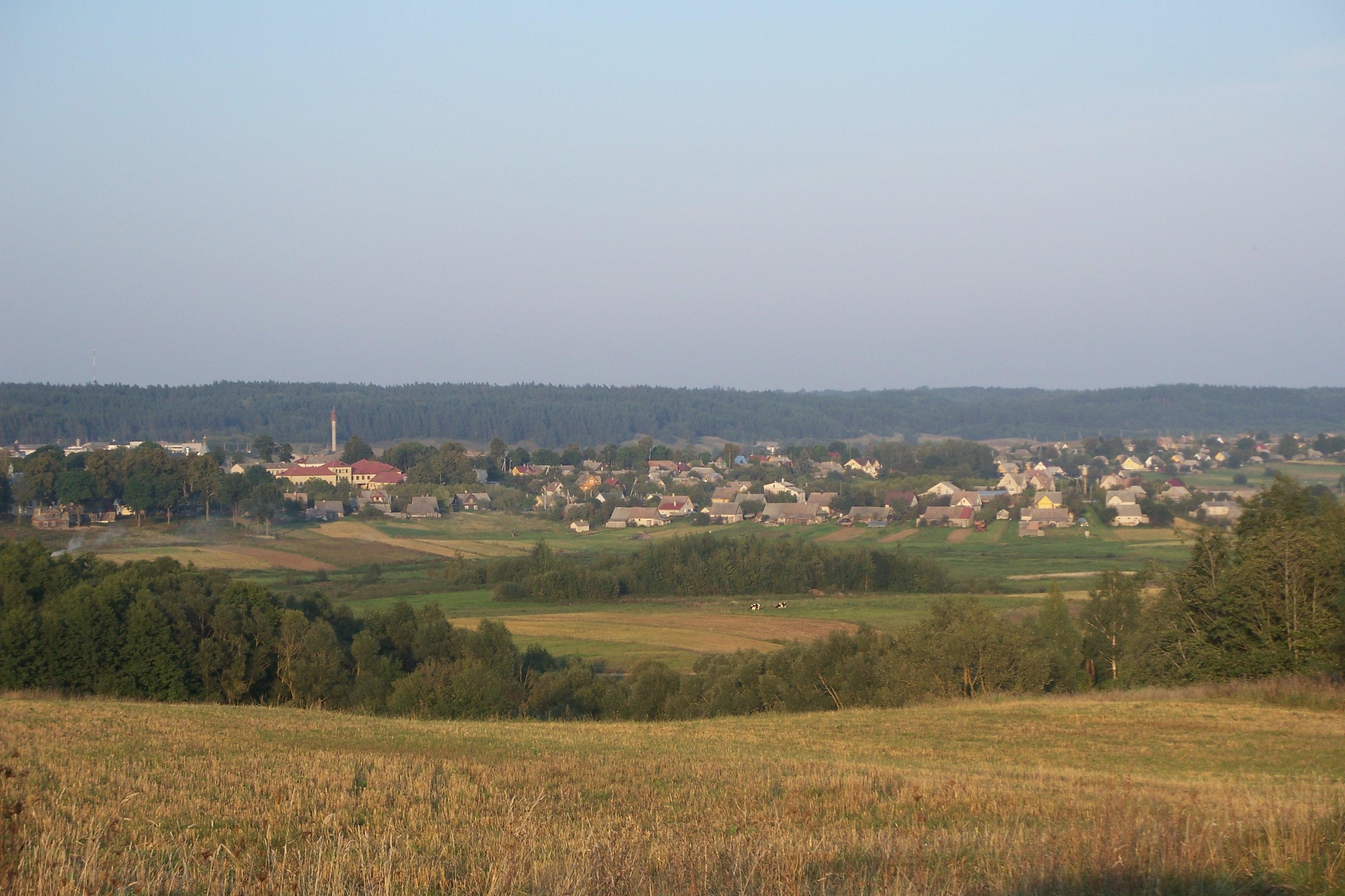 Semeliškės, Elektrėnų sav.